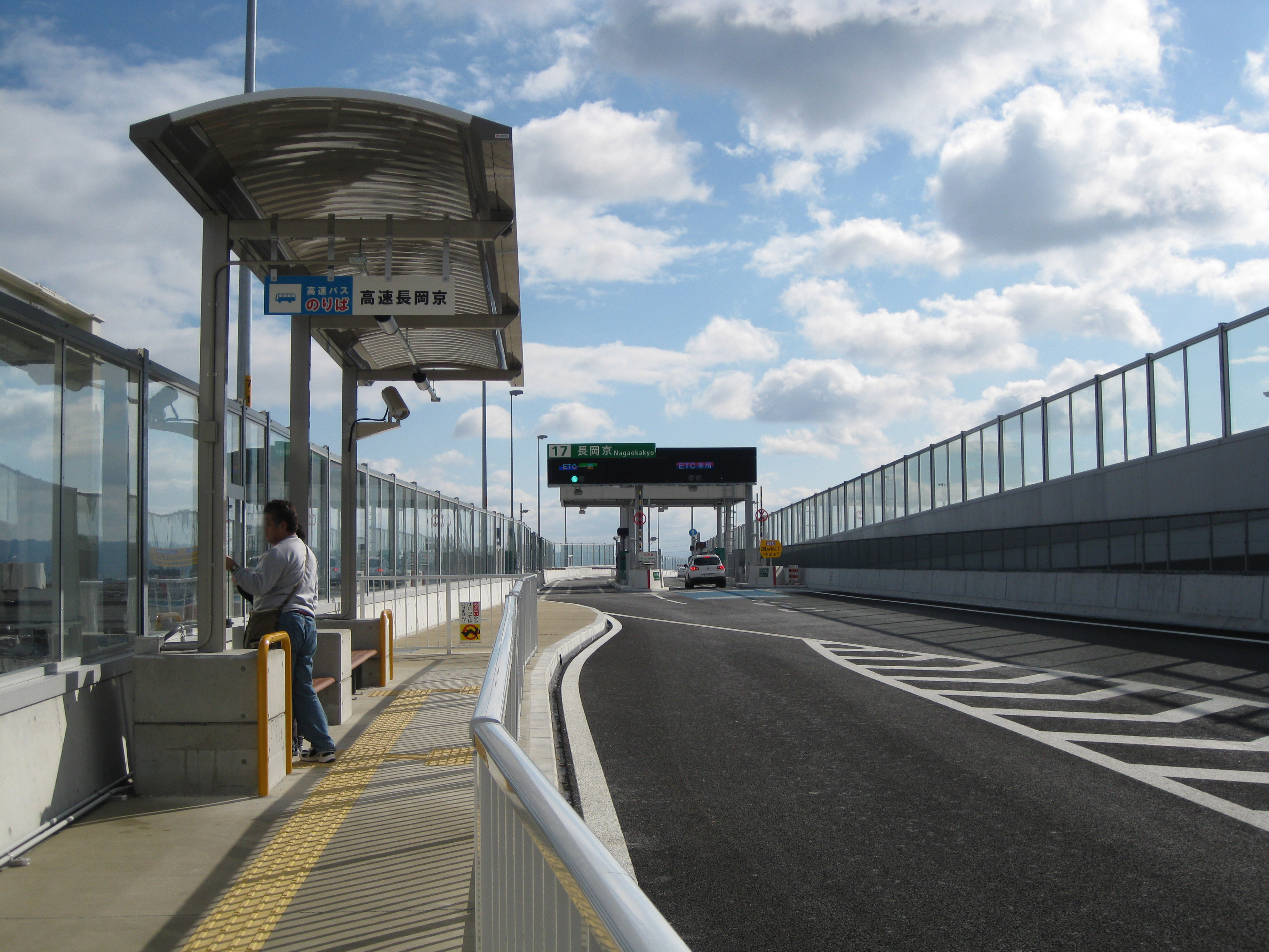 長岡京バスストップ